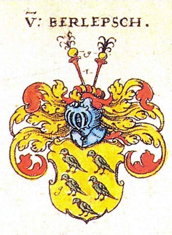 Stammwappen